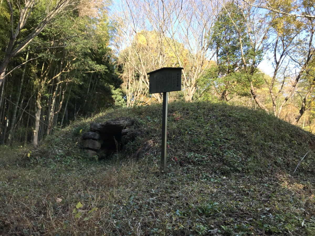 いで丸山古墳 全体（南から北向きに撮影）